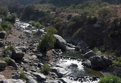 Vista al Río Colina, Región Metropolitana, Chile